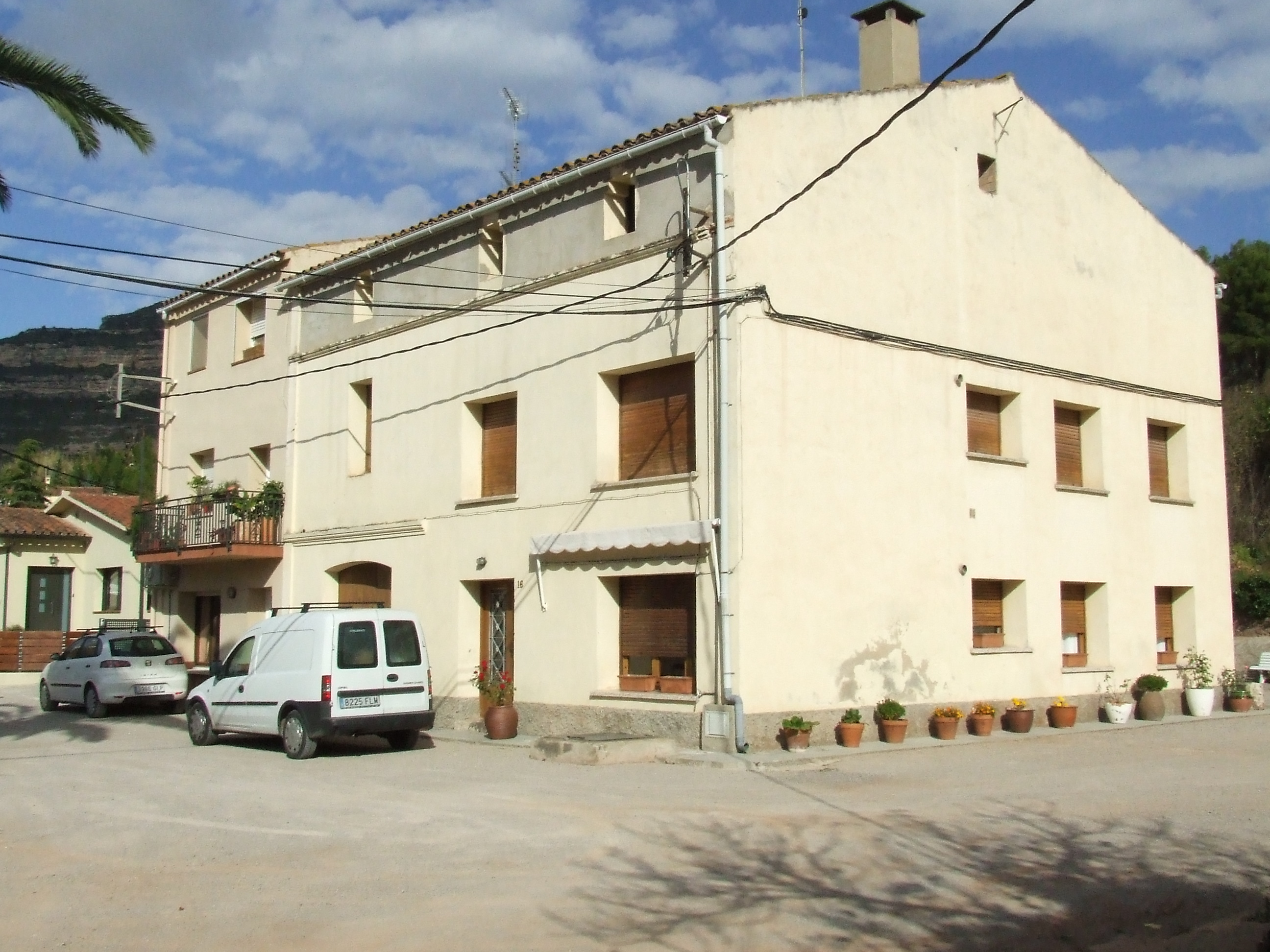 Can Ramon Boneto (Riells del Fai, Bigues i Riells, Vallès Oriental)